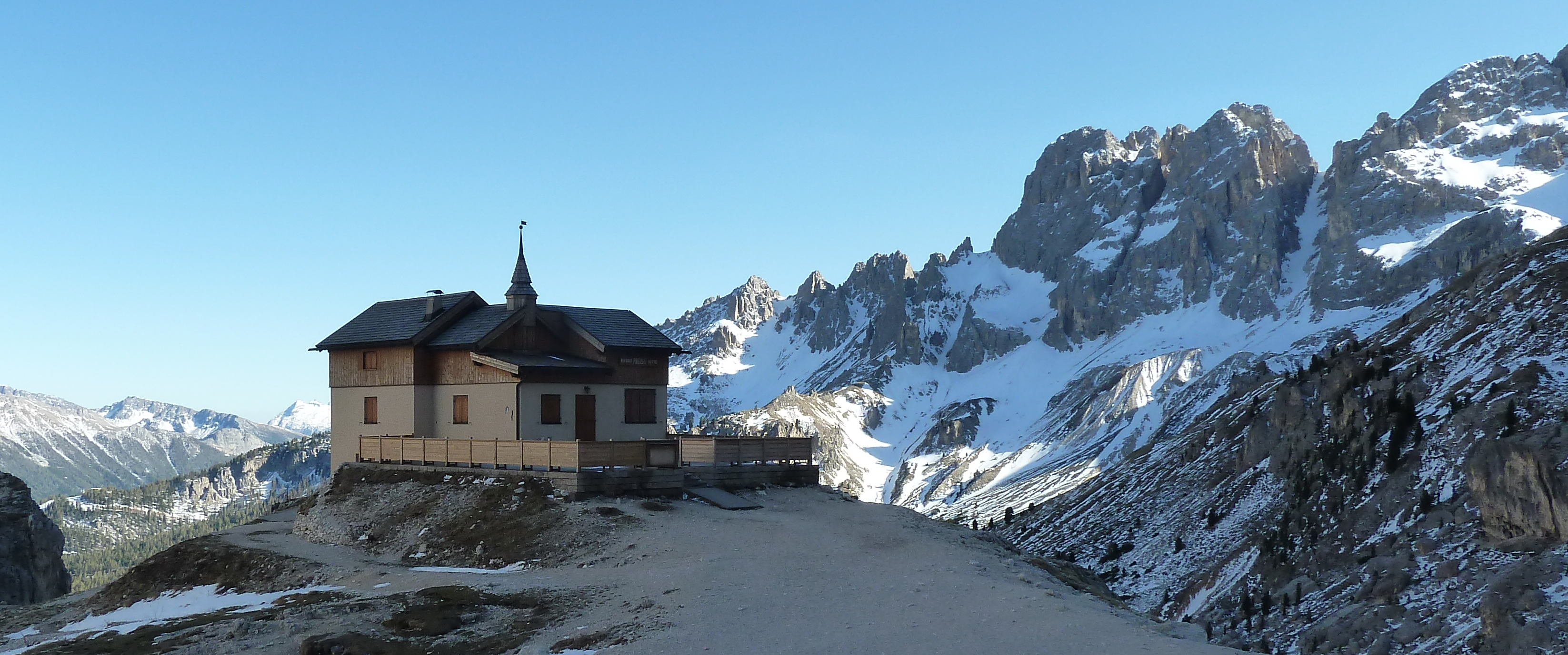 Refugio Paul Preuss (2243 m), Dolomiti